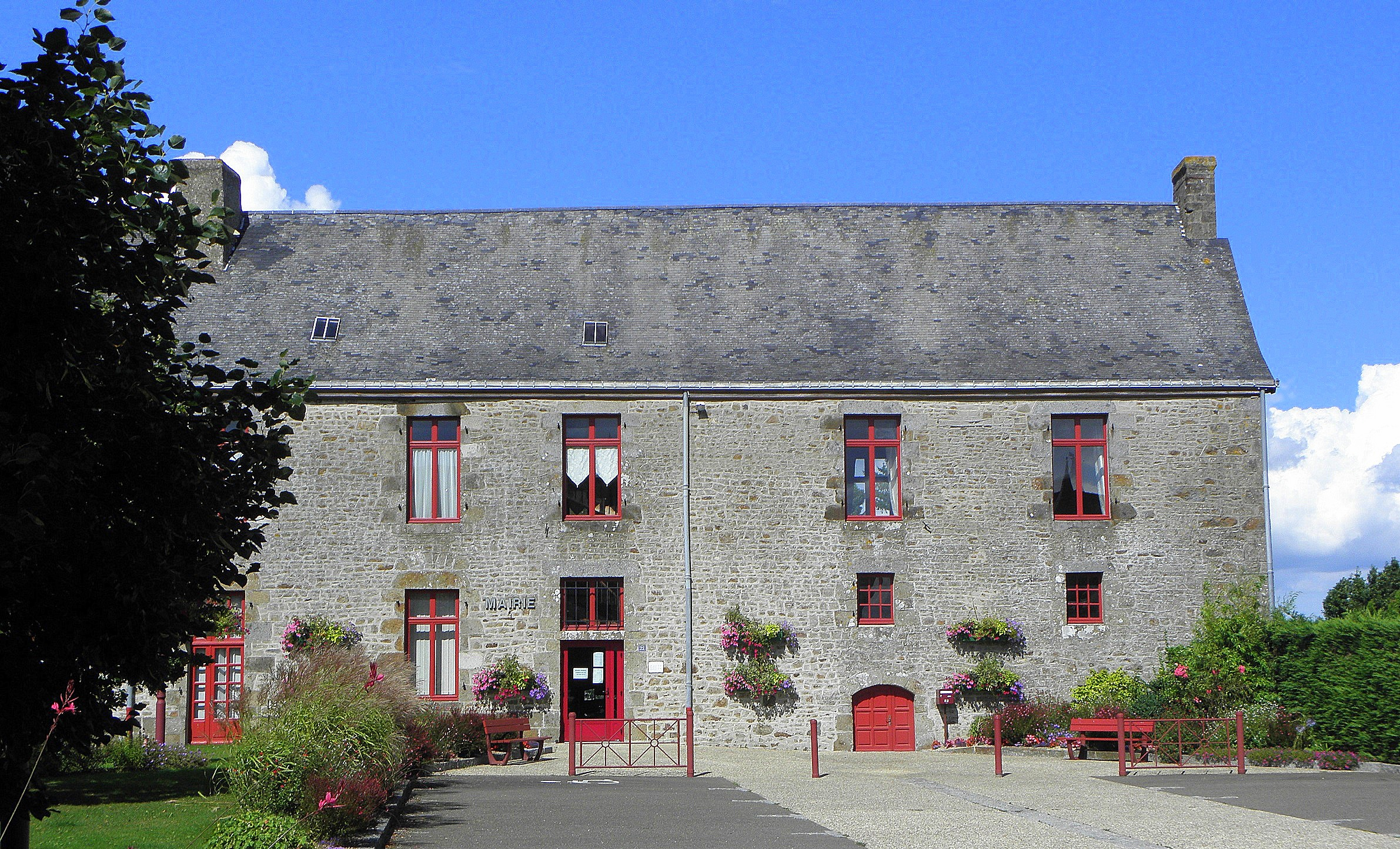 Mairie d'Oisseau (53).